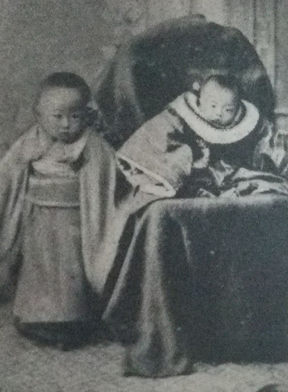 生後45日の末弘厳太郎（右。左は姉）